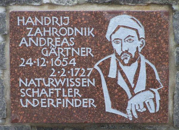 Denkmal in Quatitz: Tafel für Andreas Gärtner